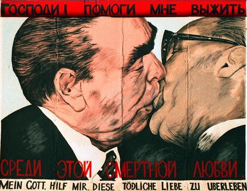 25.7.1991 "East-Side-Gallery", gelegen zwischen der Jannowitzbrücke und der Oberbaumbrücke. Reste der Berliner Mauer, die nach der Öffnung von vorwiegend ostdeutschen Künstlern auf der Ost-Seite bemalt wurden.